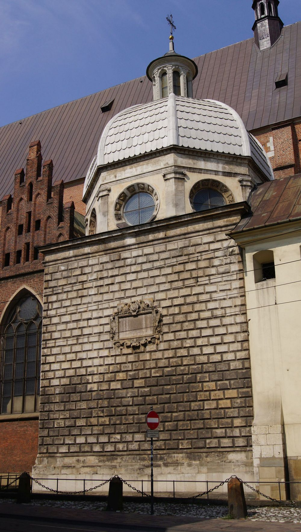 Mauzoleum Myszkowskich w Krakowie